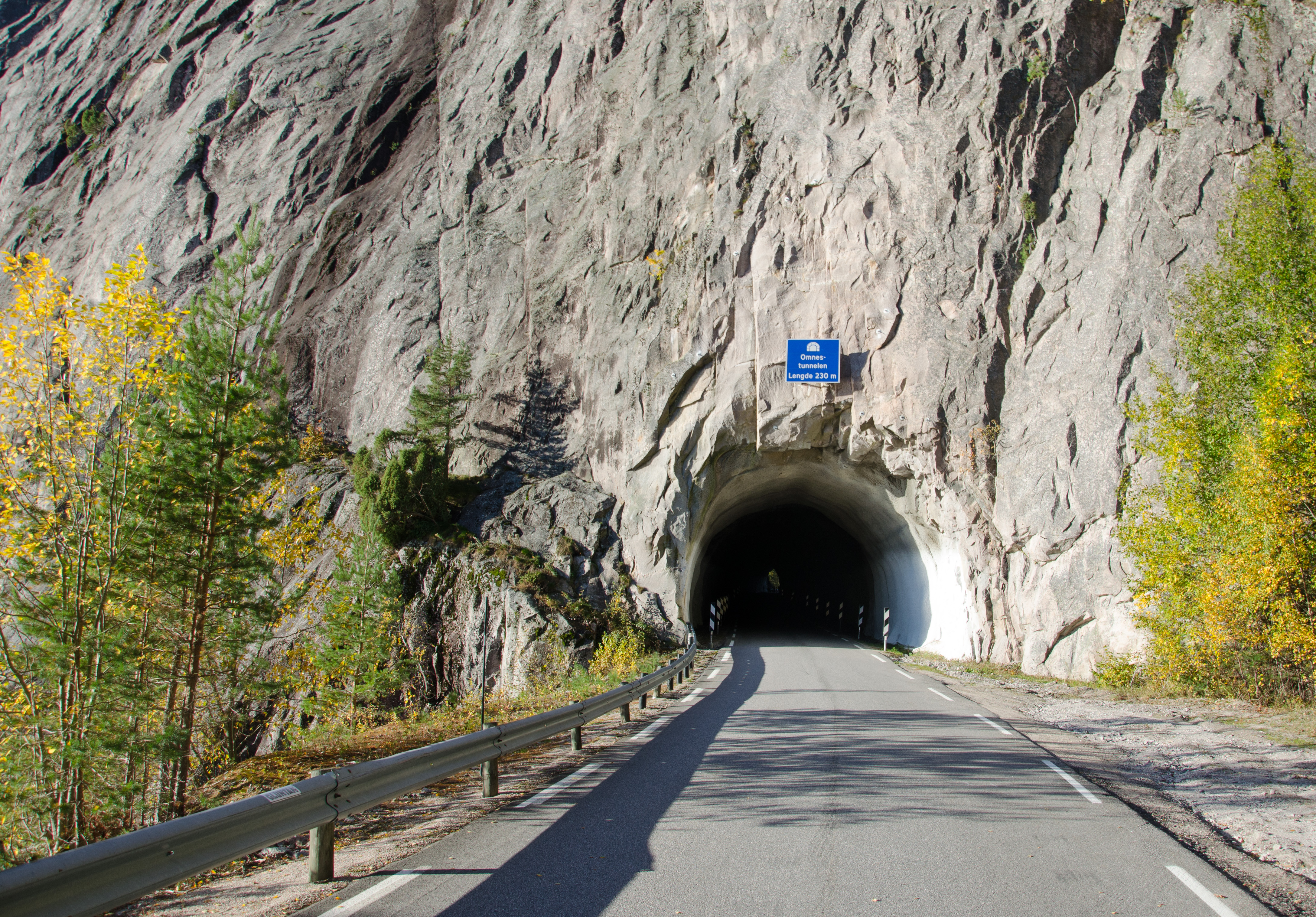 Omnestunnelen på fv.106 i Nome i Telemark